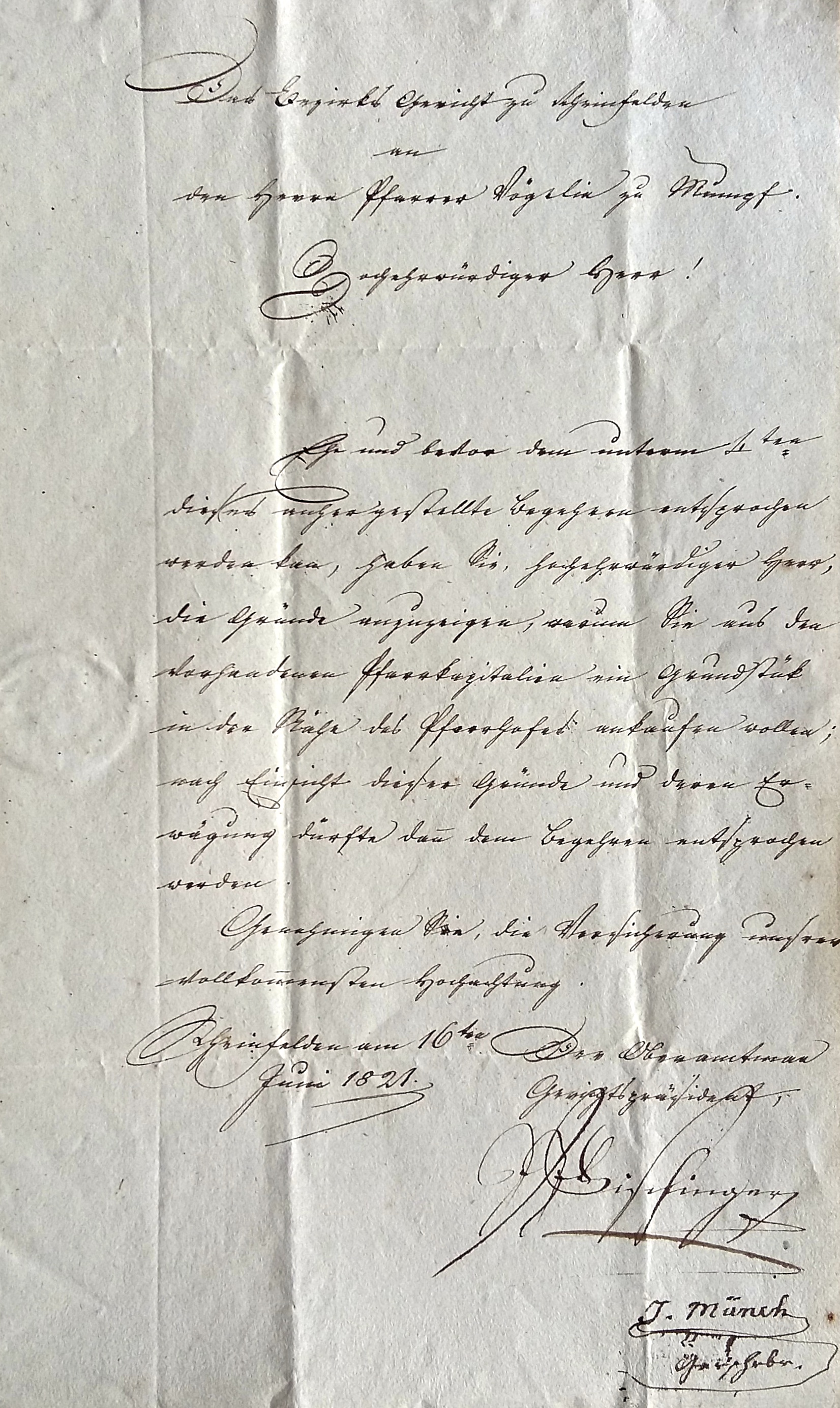 Brief des J. B. Fischinger als Oberamtmann und Gerichtspräsident an den damaligen Mumpfer Pfarrer Vögelin vom 16. Juni 1821.